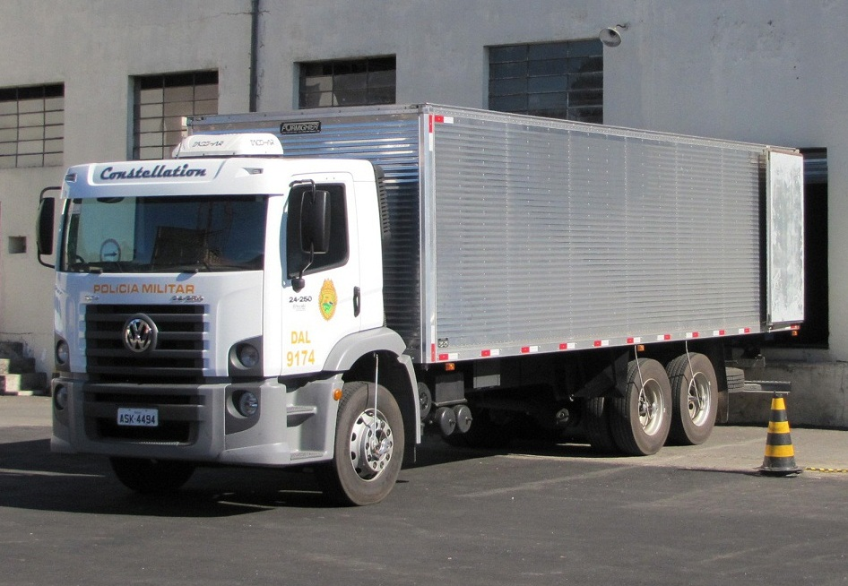 Viatura da Diretoria de Apoio Logístico da Polícia Militar do Paraná.